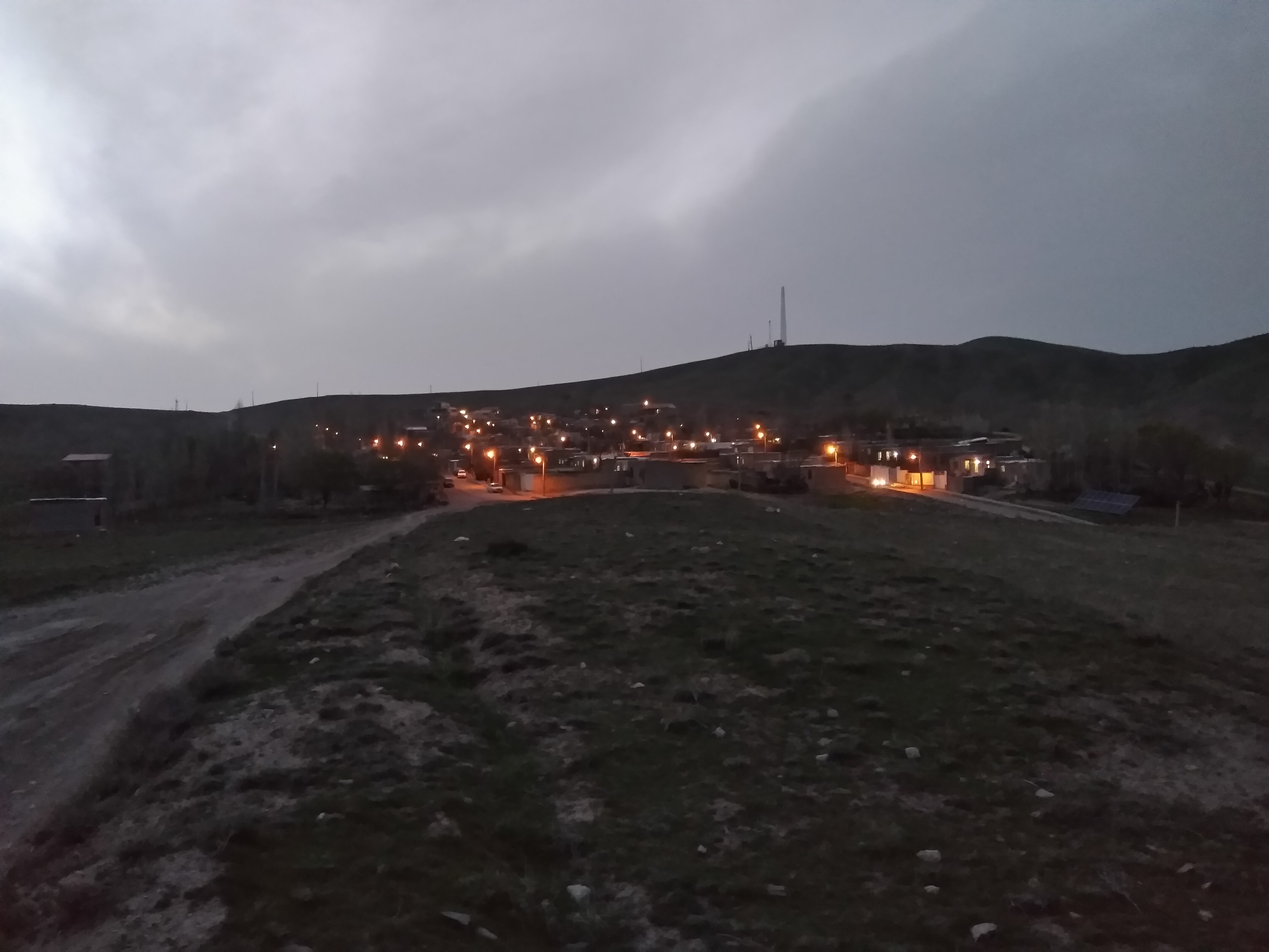 تصویری از روستای خسرود در شب